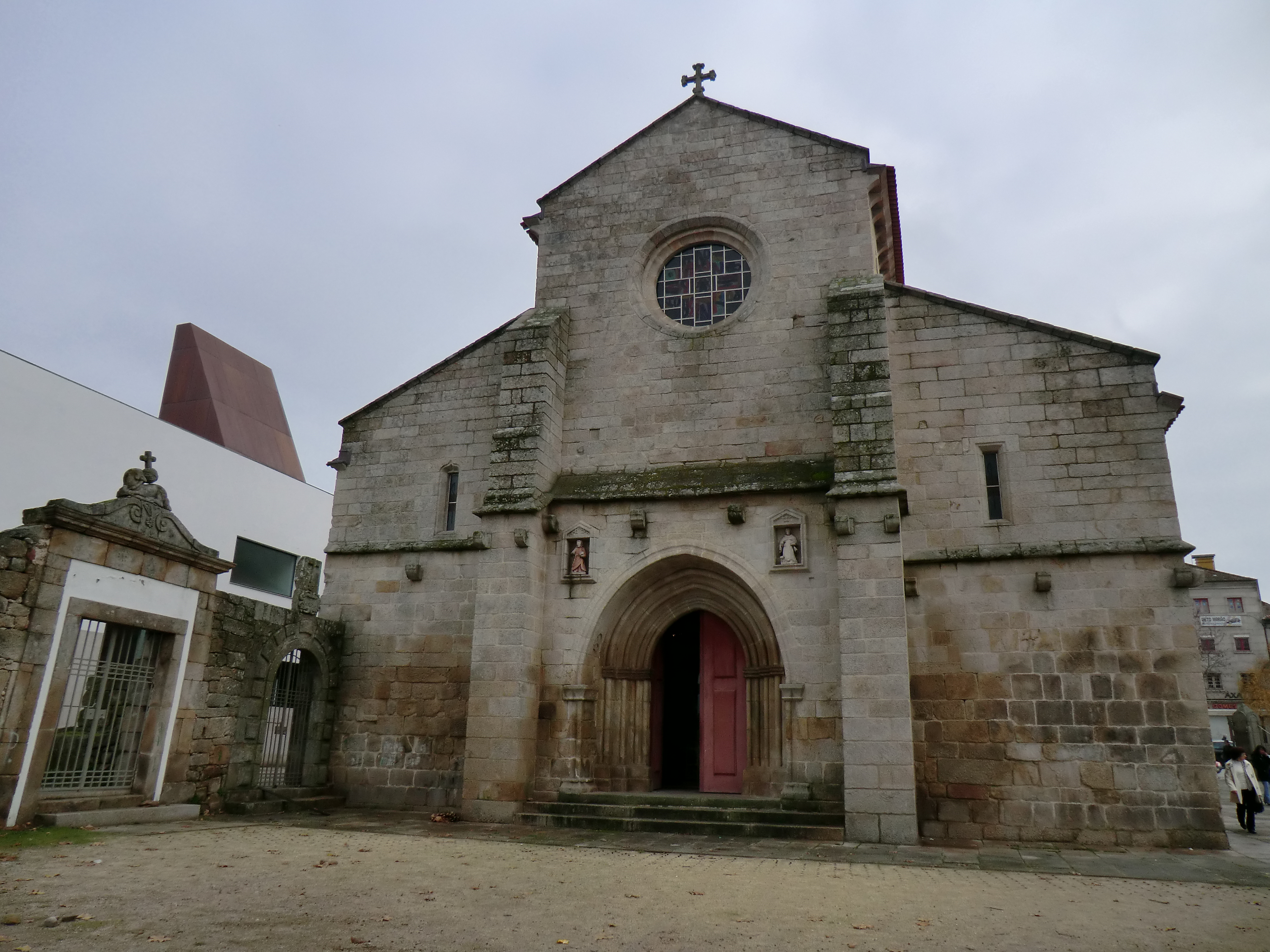 Igreja de São Domingos ou Sé de Vila Real